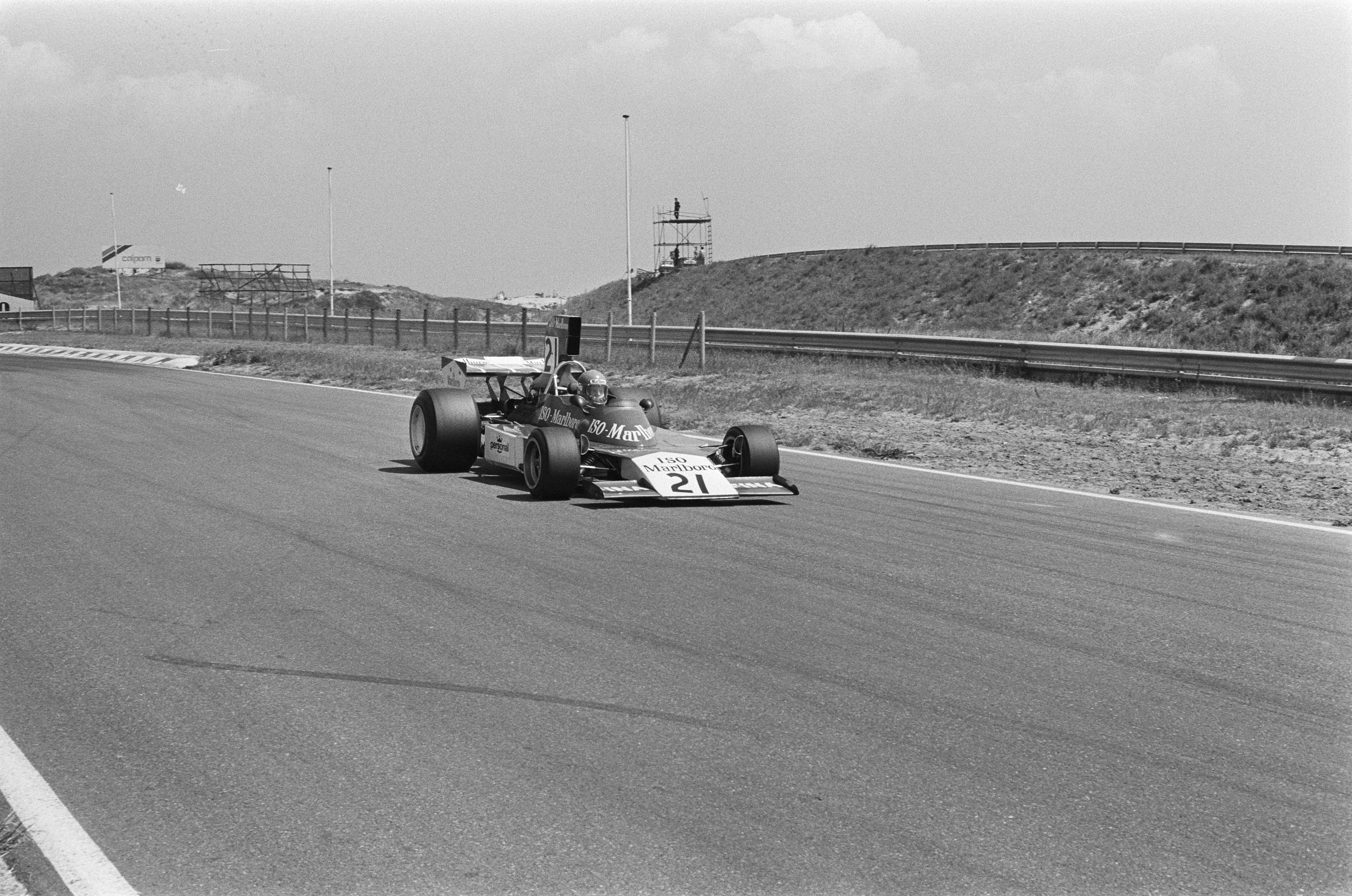 Training Grand Prix op Zandvoort; Gijs van Lennep in actie.